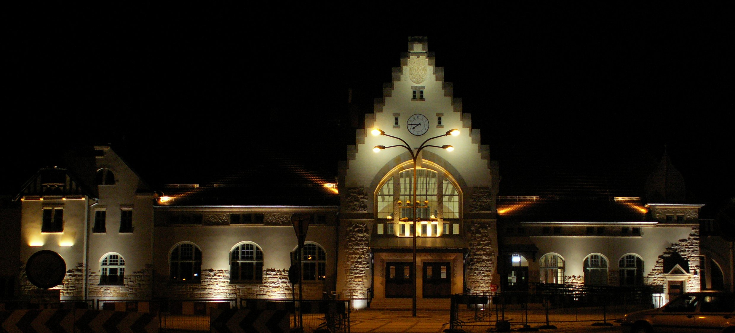 Odnowiony dworzec kolejowy Świdnica Miasto (luty 2014), planowane centrum przesiadkowe.